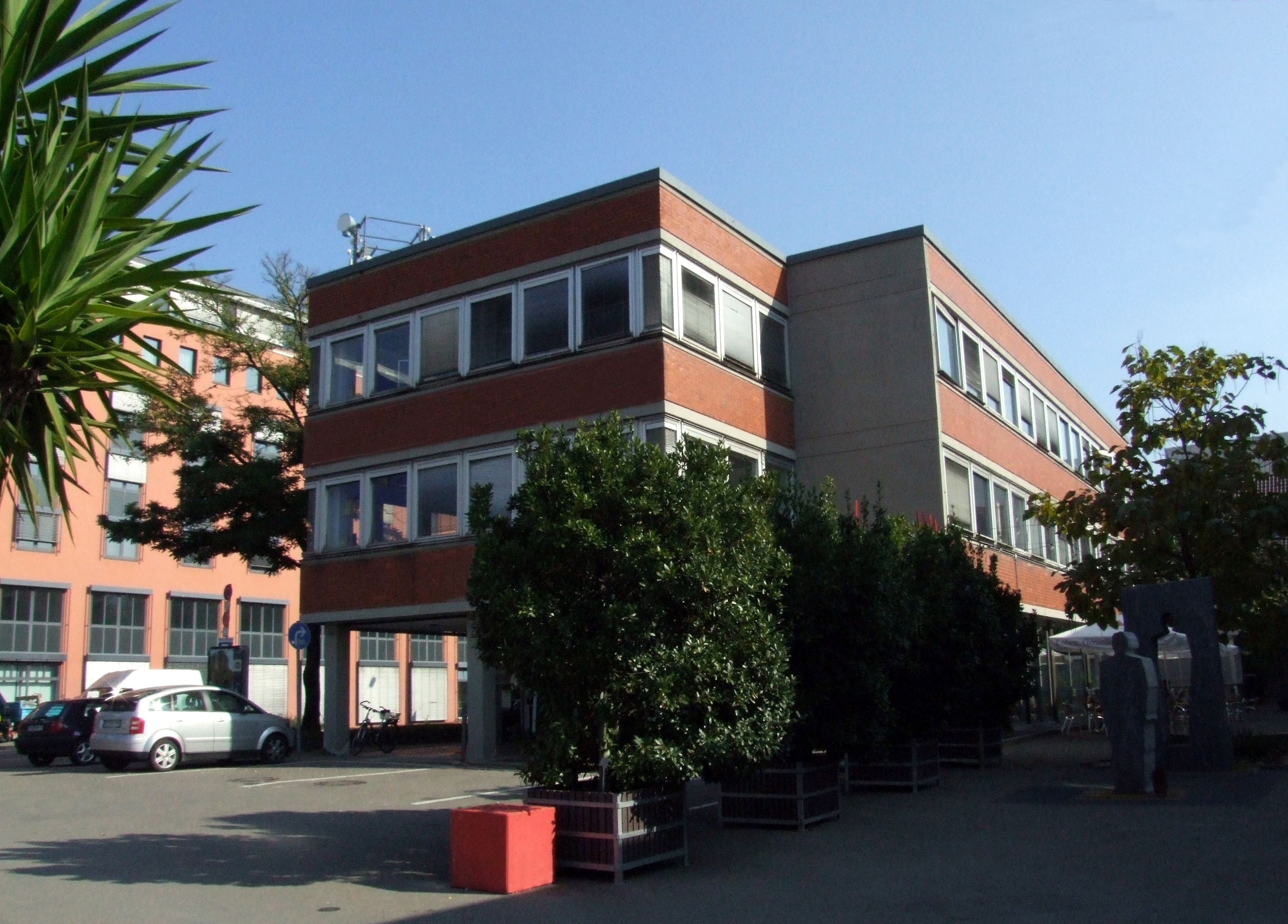 Haus der Jugendarbeit, Stuttgart Pragsattel